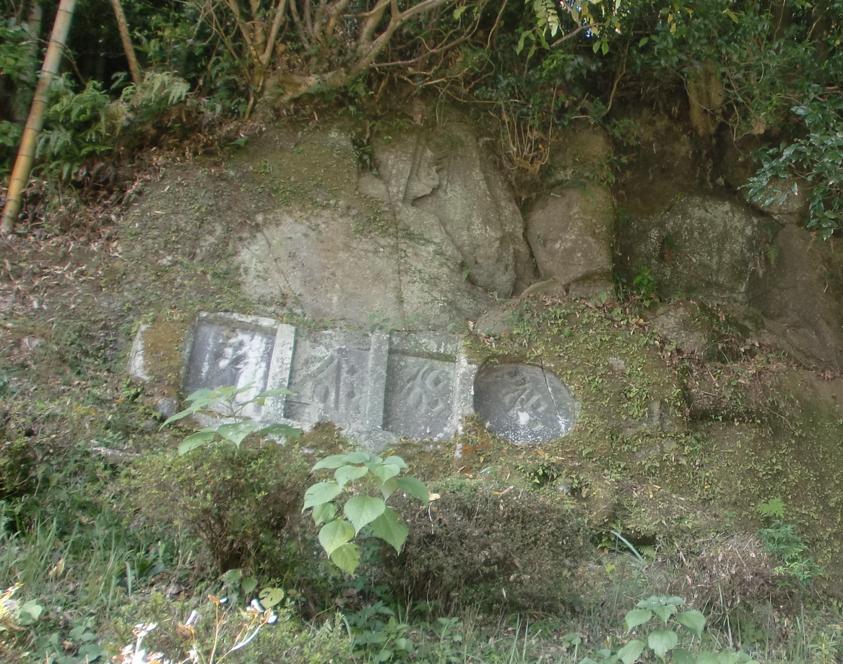 世界で唯一現存する「オーンク」と呼ばれる仏種子梵字が書かれた倉野磨崖仏の石碑。